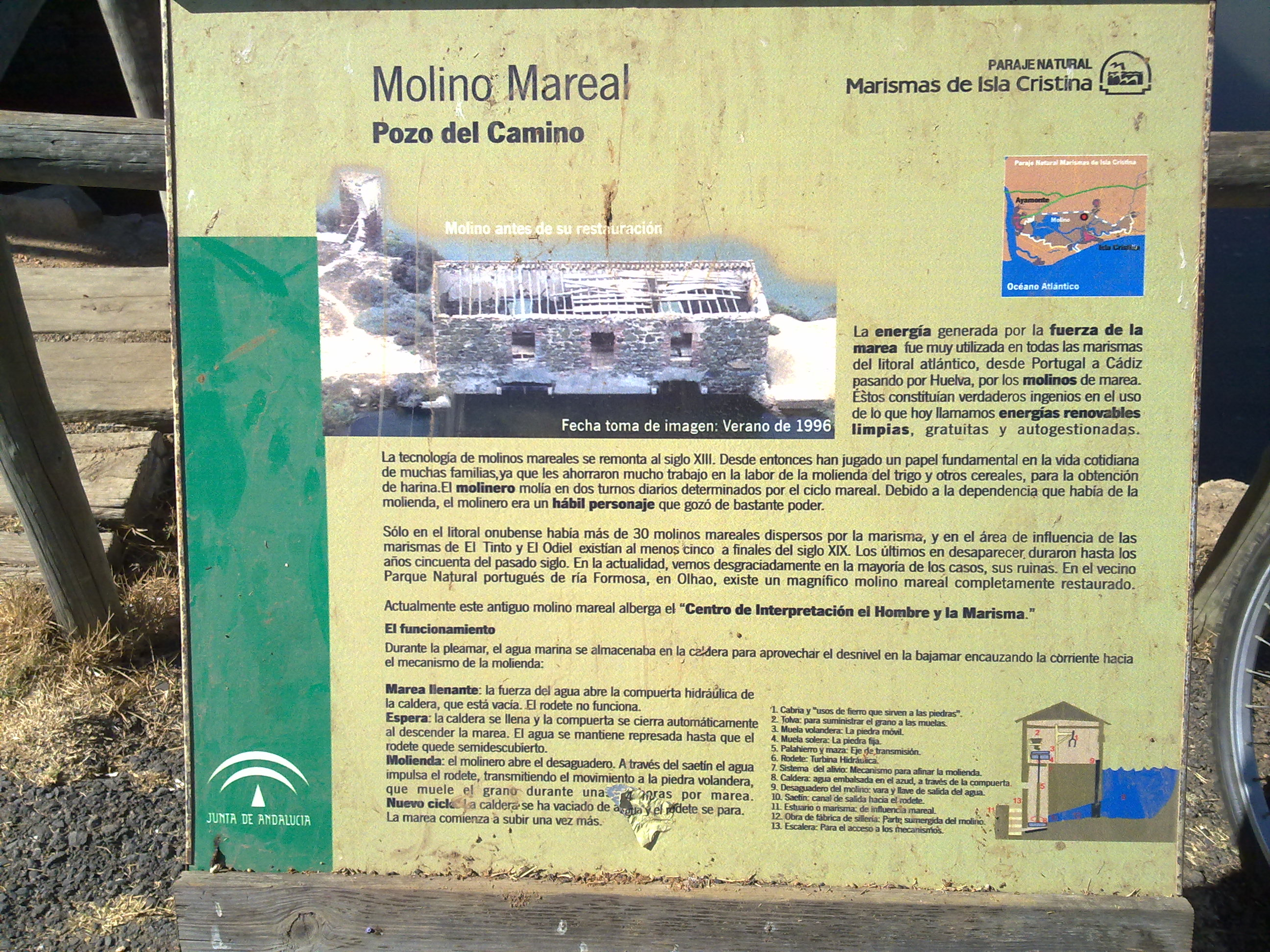 Placa descriptiva del molino mareal de Pozo del Camino en el Paraje Natural de las Marismas de Isla Cristina